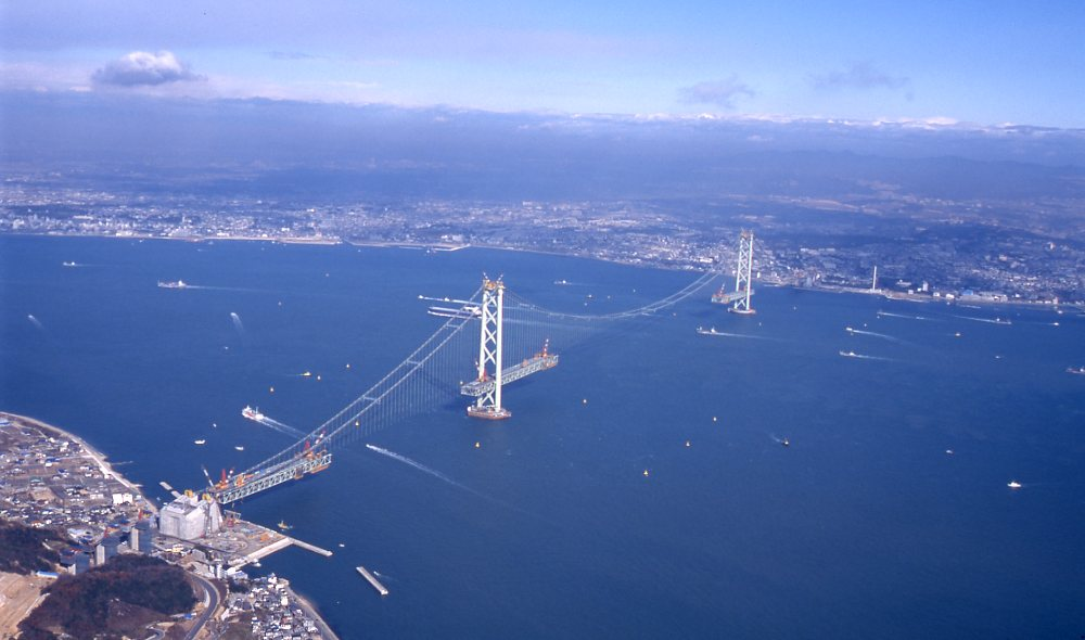 明石海峡大橋（1995年12月8日）